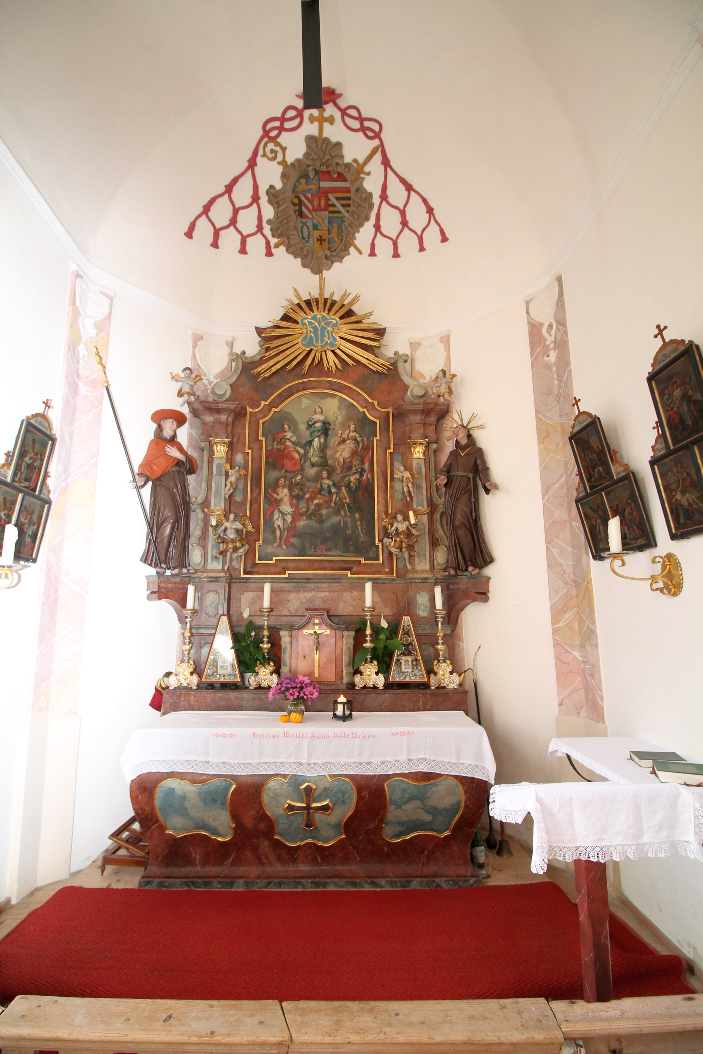 Knappenkapelle St. Anna in Hütten (Leogang), Land Salzburg, Österreich.